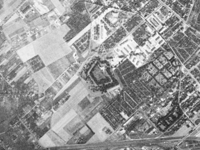 Fort VIIIa Twierdzy Poznań sfotografowany przez satelitę KH-4A 1023, 23 sierpnia 1965 r.